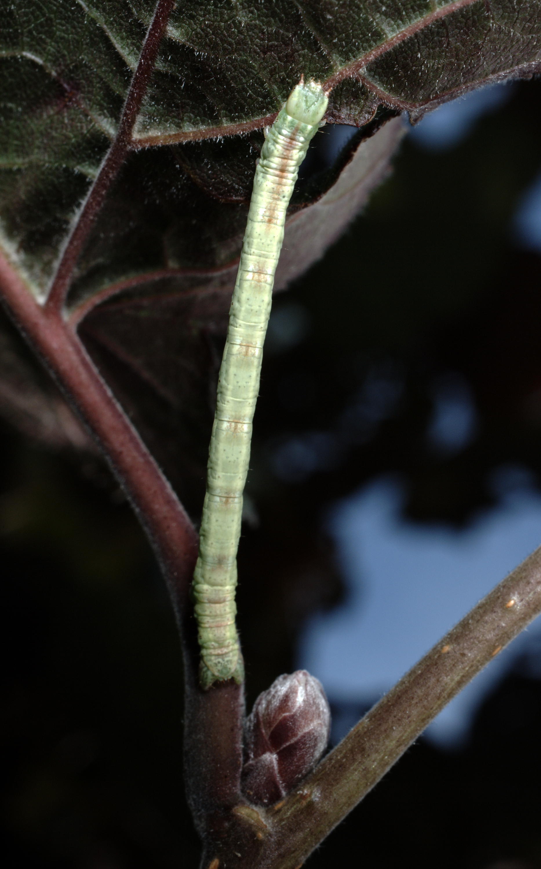 Chenille d'Ennomos fuscantaria (Ennomos du troene) sur feuille de noisetier, photographiée en Normandie.